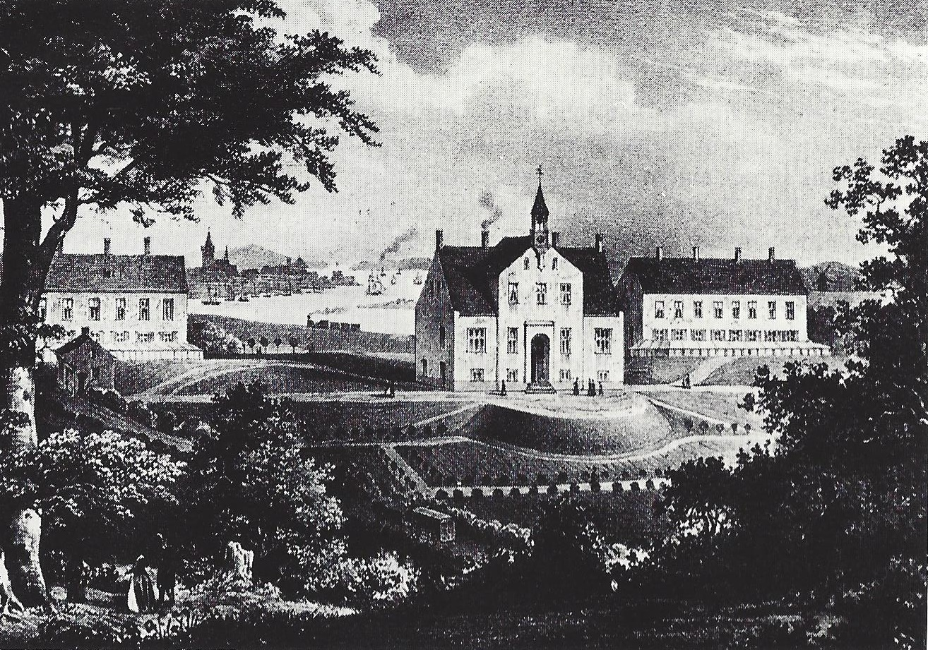 Lithographie der psychiatrischen Klinik Hornheim bei Kiel. Im Hintergrund die Altona-Kieler Bahn (1842) und die Kieler Förde.